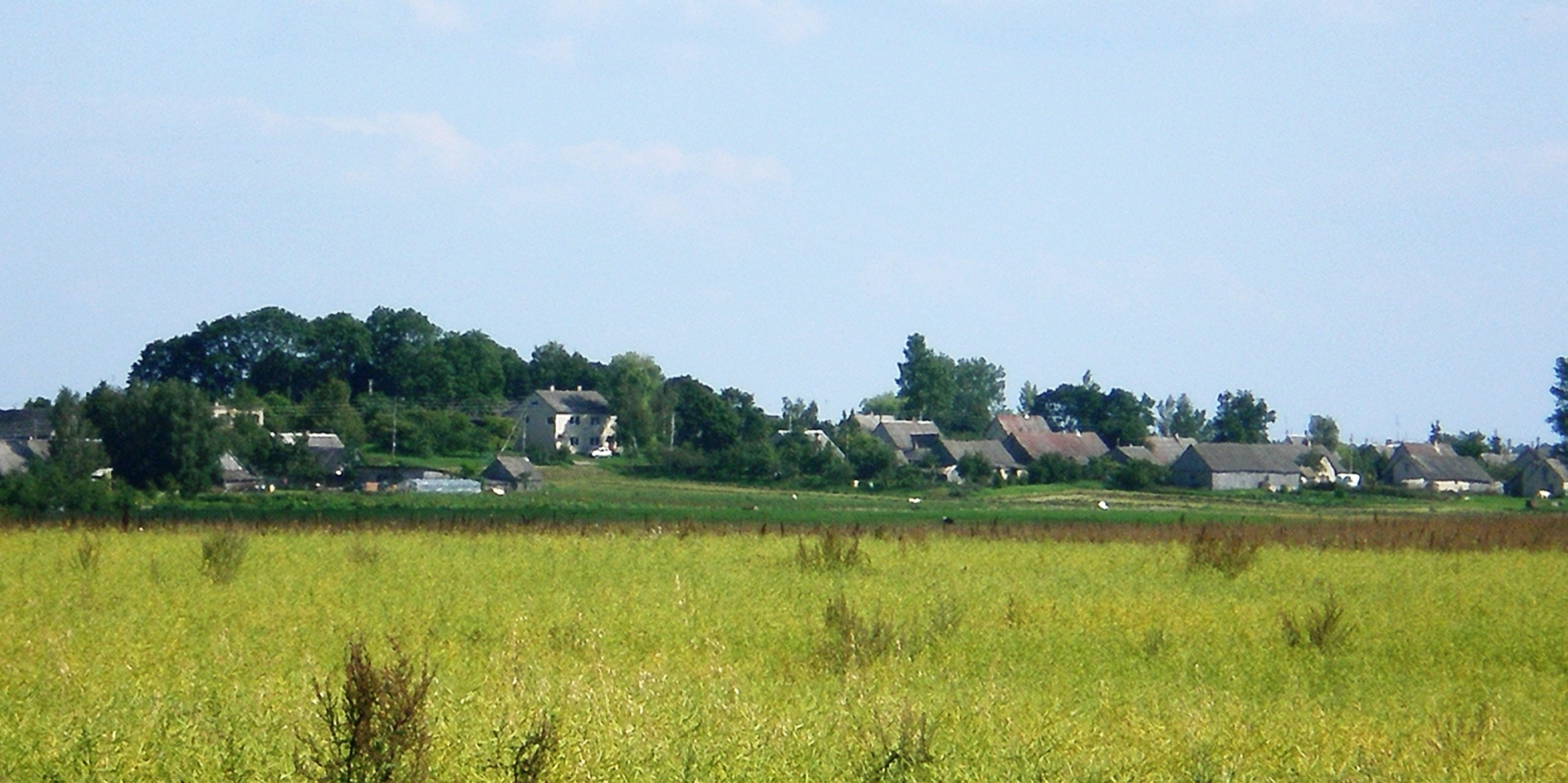 Jakšiai, Kėdainių raj.